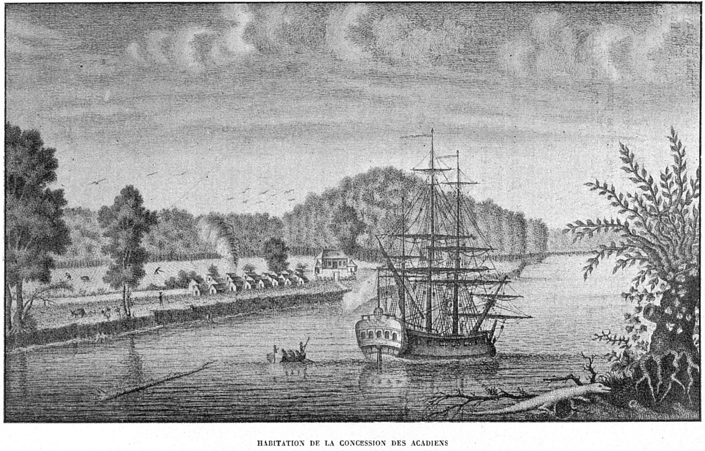 « Habitation de la concession des Acadiens » en Louisiane. Dessin non daté et signé, publié en 1905 dans Les dernières années de la Louisiane française... par Marc Villiers Du Terrage.